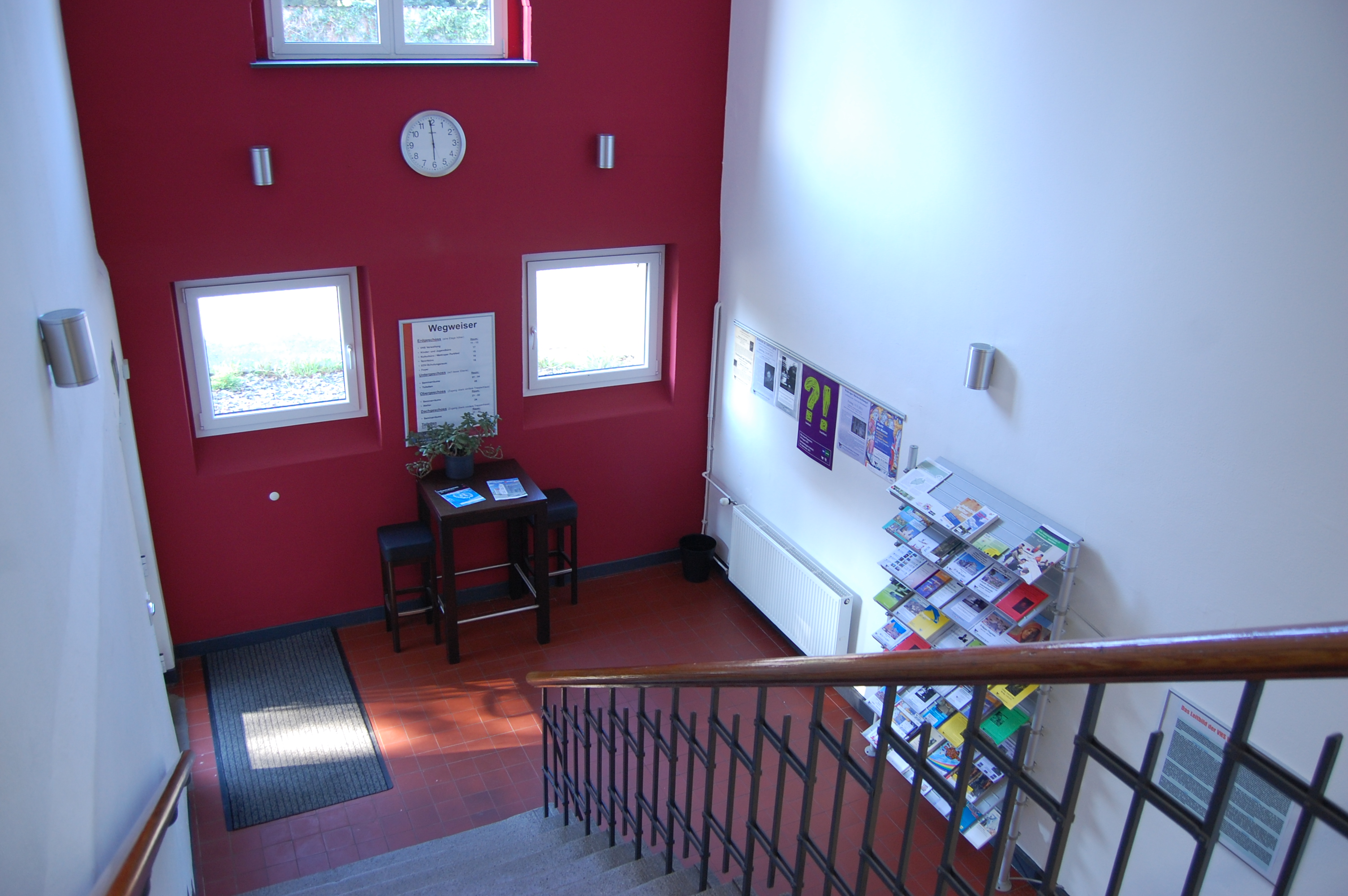 Deitsch: VHS-Gebäude, Treppenhaus